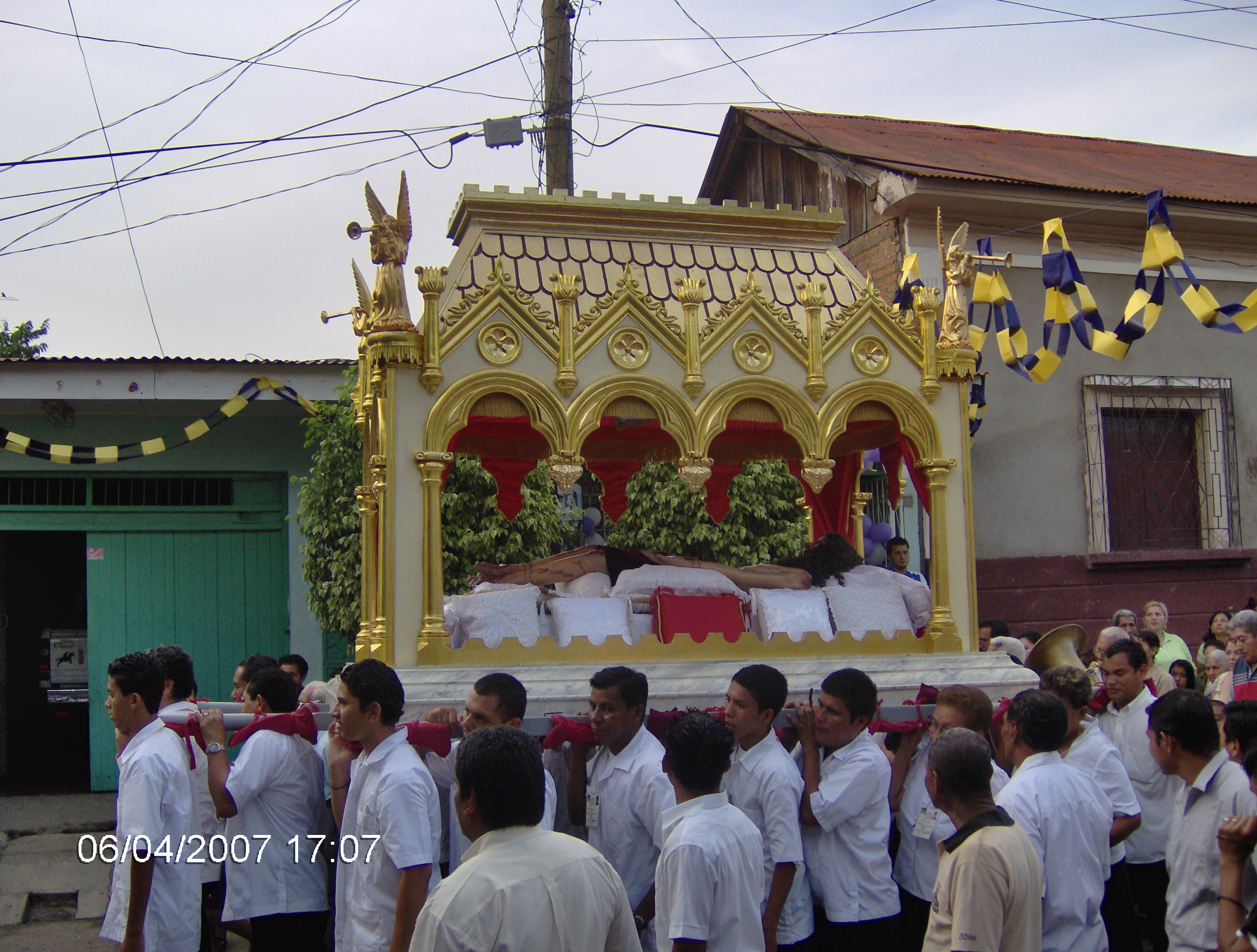 Procesion Santo Entierro. Iglesia Nuestra Sra de Guadalupe. León, Nicaragua